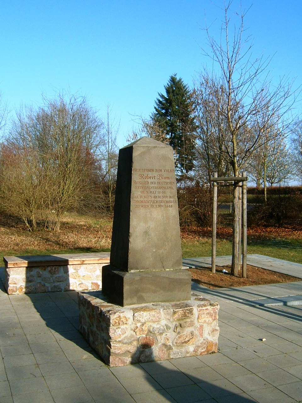 Gedenkstein in Petterweil (Karben) zur Rede Robert Blums an dieser Stelle.Text: HIER SPRACH ZUM VOLKE Robert Blum MITGLIED DER DEUTSCHEN NATIONALVERSAMMLUNG. AM 9. JULI 1848 GEB. ZU KÖLN AM 10. NOV. 1807. STANDRECHTLICH ERSCHOSSEN ZU WIEN AM 9. NOV. 1848